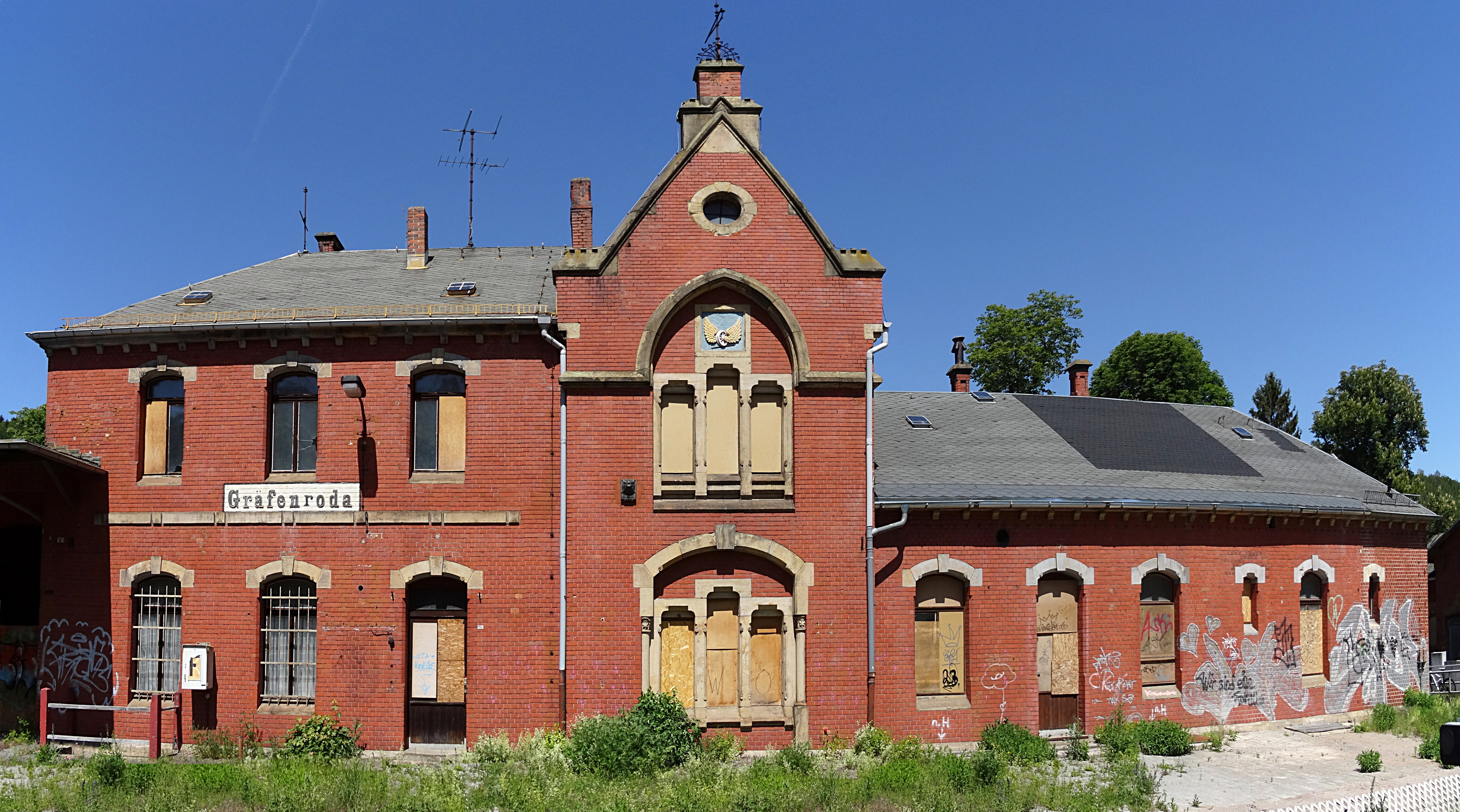 Bahnhof von Gräfenroda (Thüringen) 2020